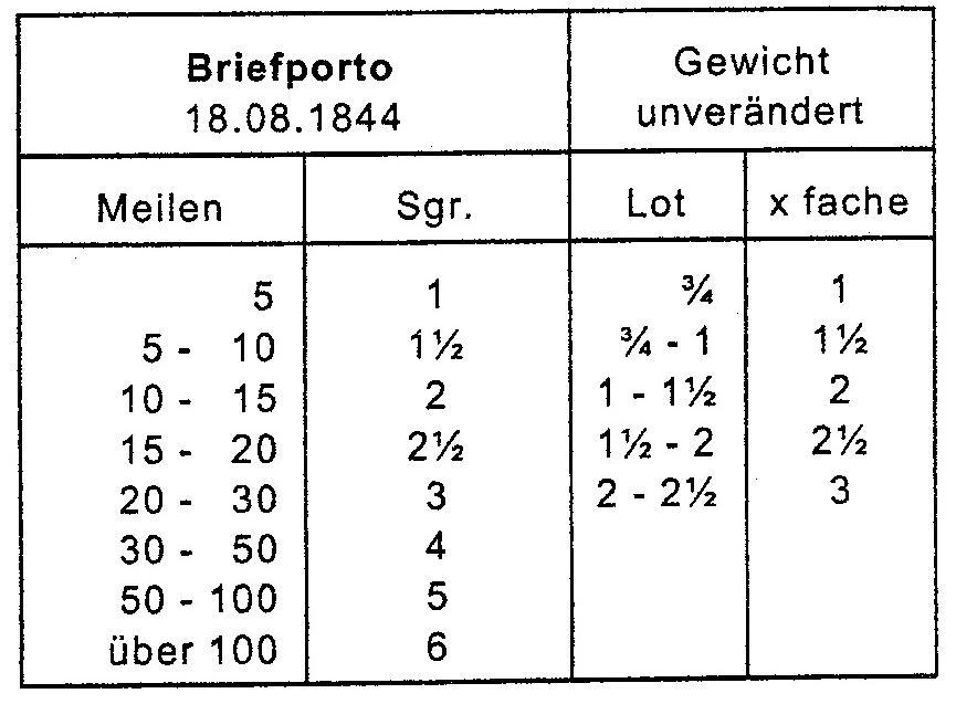 1844 Biefpost